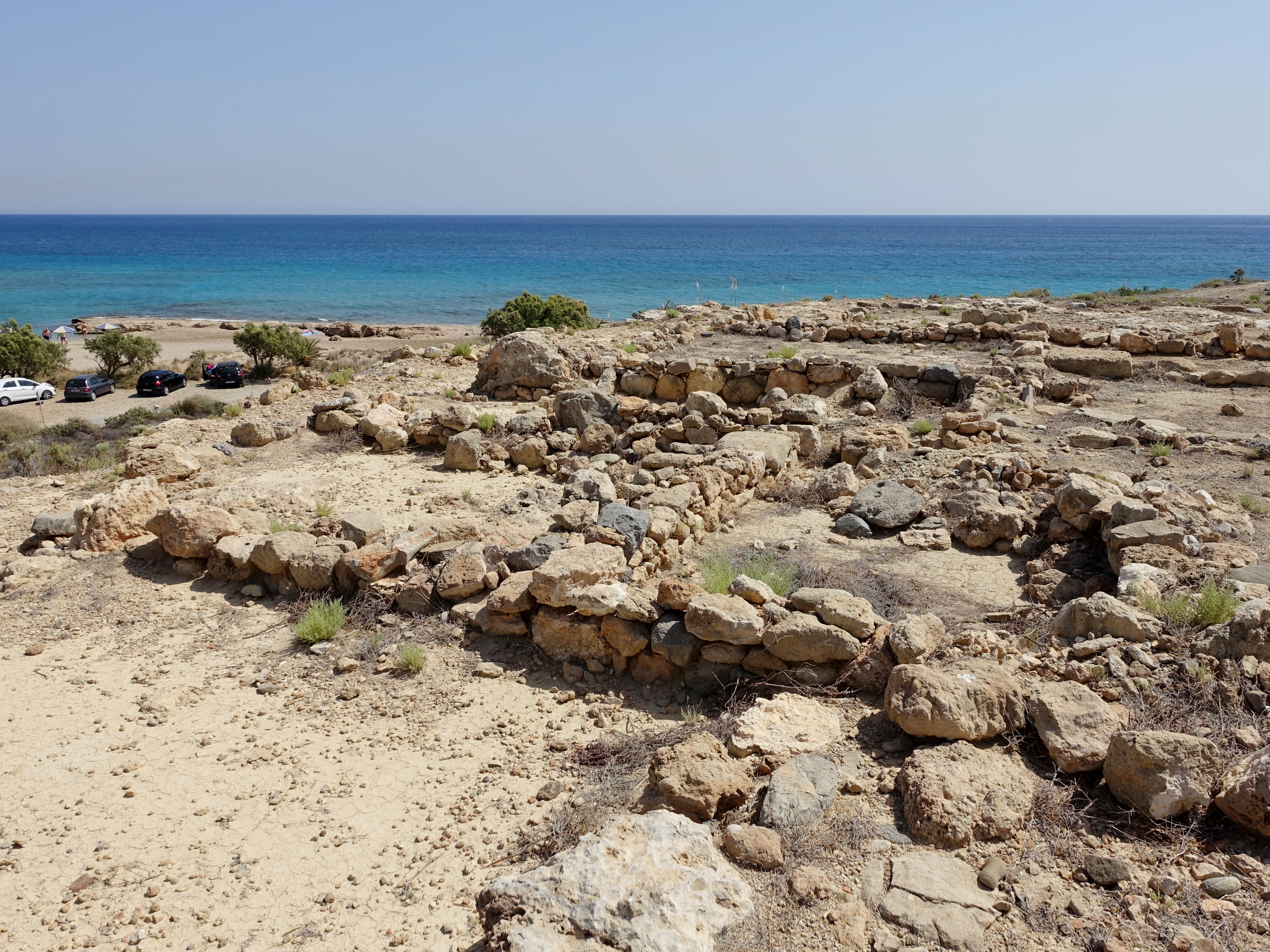 Hellenistische Siedlung auf dem Hügel Farmakokefalo (Φαρμακοκέφαλο) an der Ostküste Kretas bei Xerokambos (Ξερόκαμπος), Gemeinde Sitia, Kreta, Griechenland